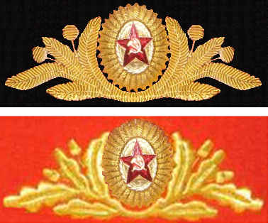 шитье 1980